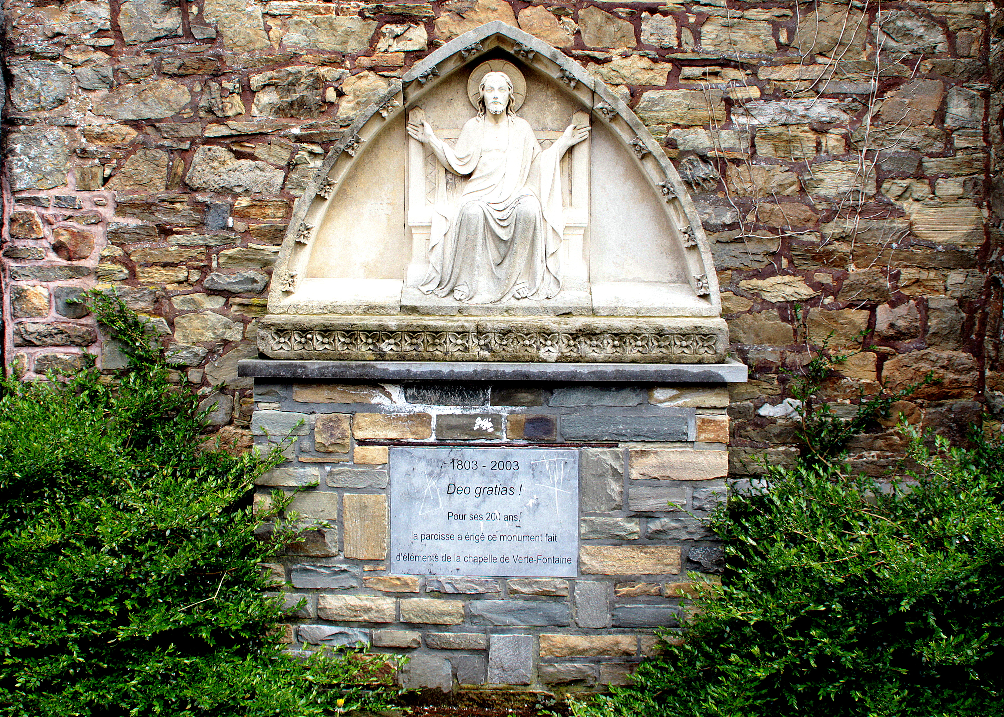 Reschter vun der aler Kapell lénks vun der Kierchepaart.